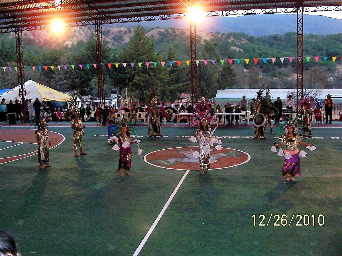 Bailable durante la fiesta patronal 2010 en San Juan Achiutla, Oaxaca, México